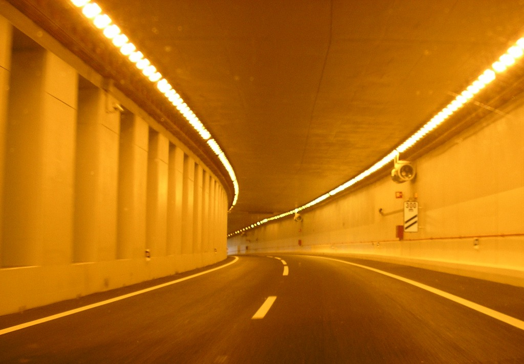 "Via de Cintura Interna" (VCI) tunnel in Vila Nova de Gaia, Porto city region, in Portugal. Author: Manuel de Sousa.